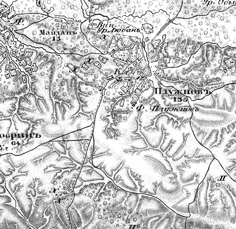 Фрагмент «Военно-топографической карты Российской Империи»: Плужновъ (село Плужне Острозького повіту Волинської губернії).